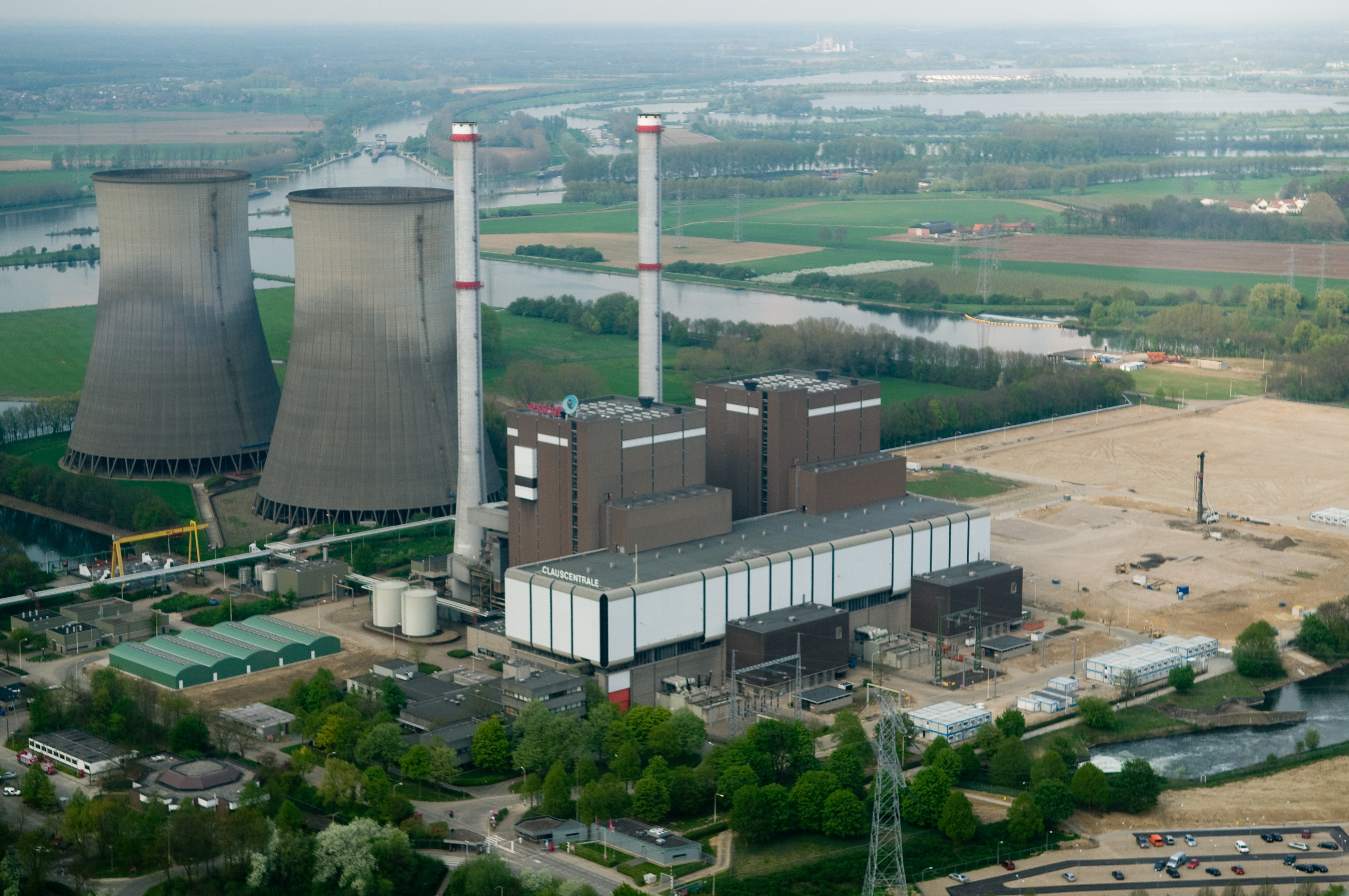 De Clauscentrale van Essent in Maasbracht. Foto: Essent; Castel Communicatie